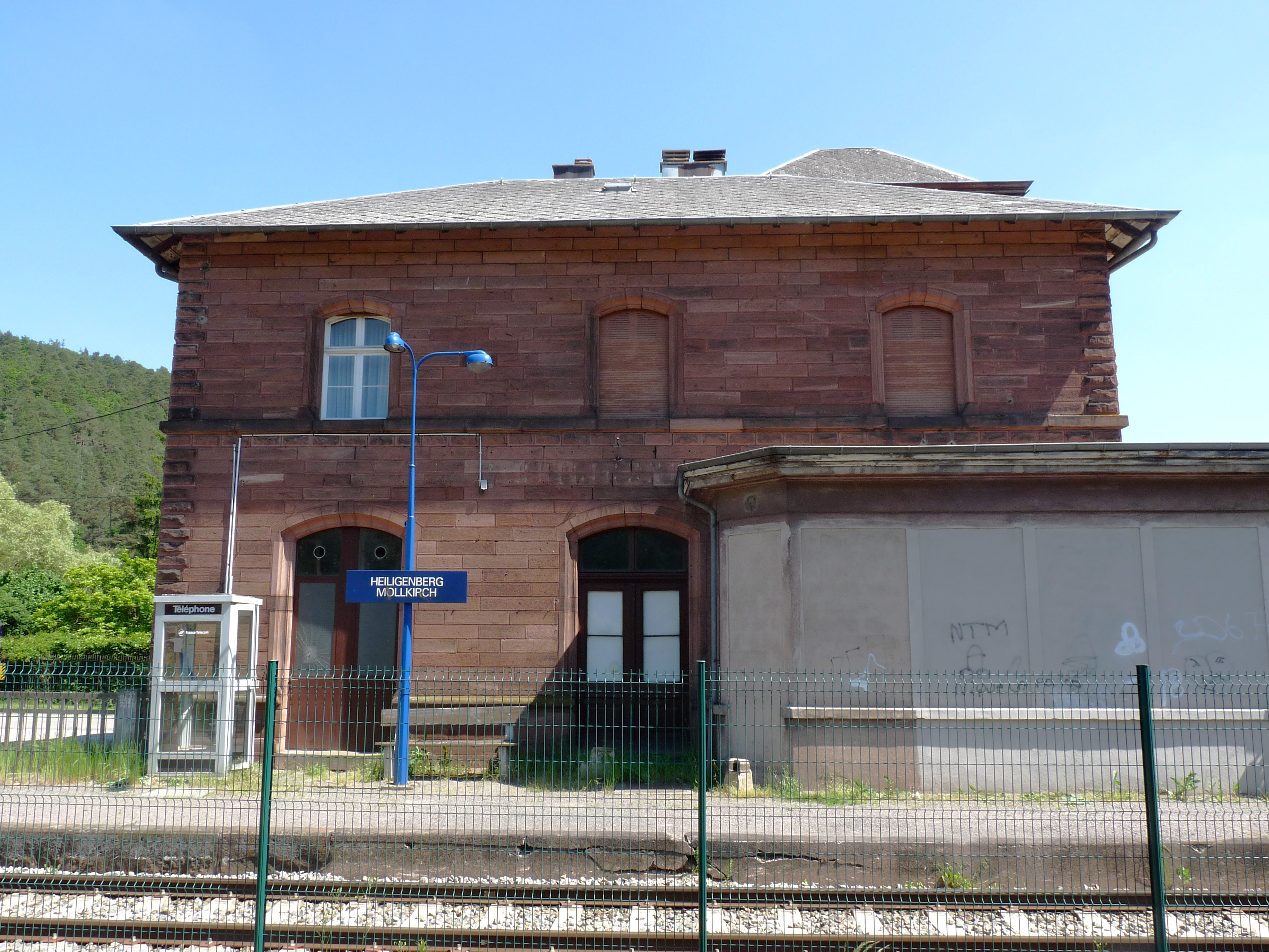 Gare de Heiligenberg-Mollkirch (Bas-Rhin). Côté quai.